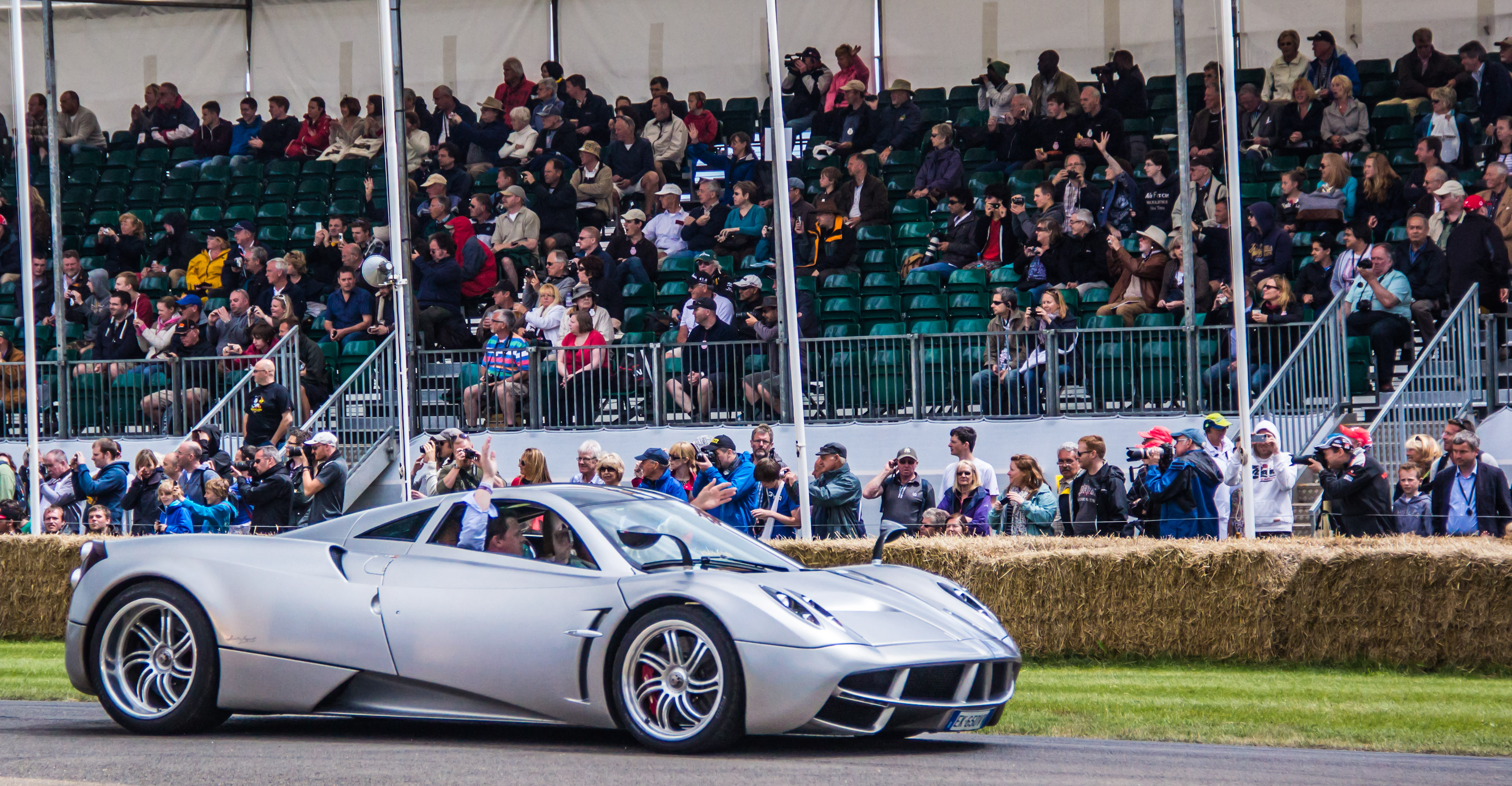 Huayra